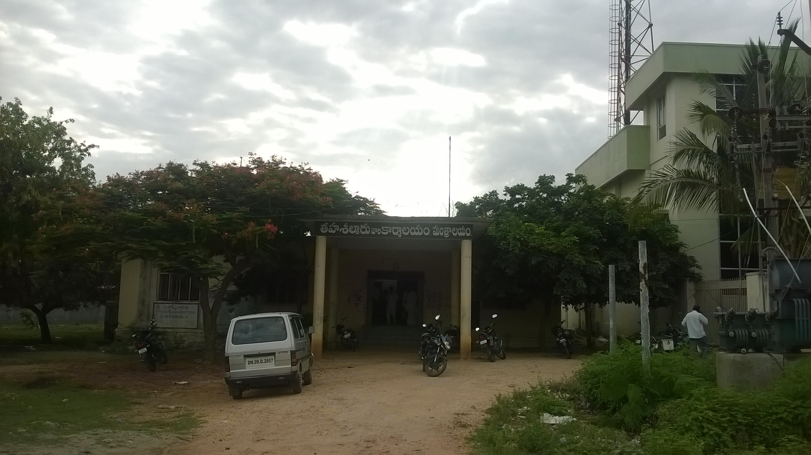 తహశీల్దారు కార్యాలయం, మంత్రాలయం